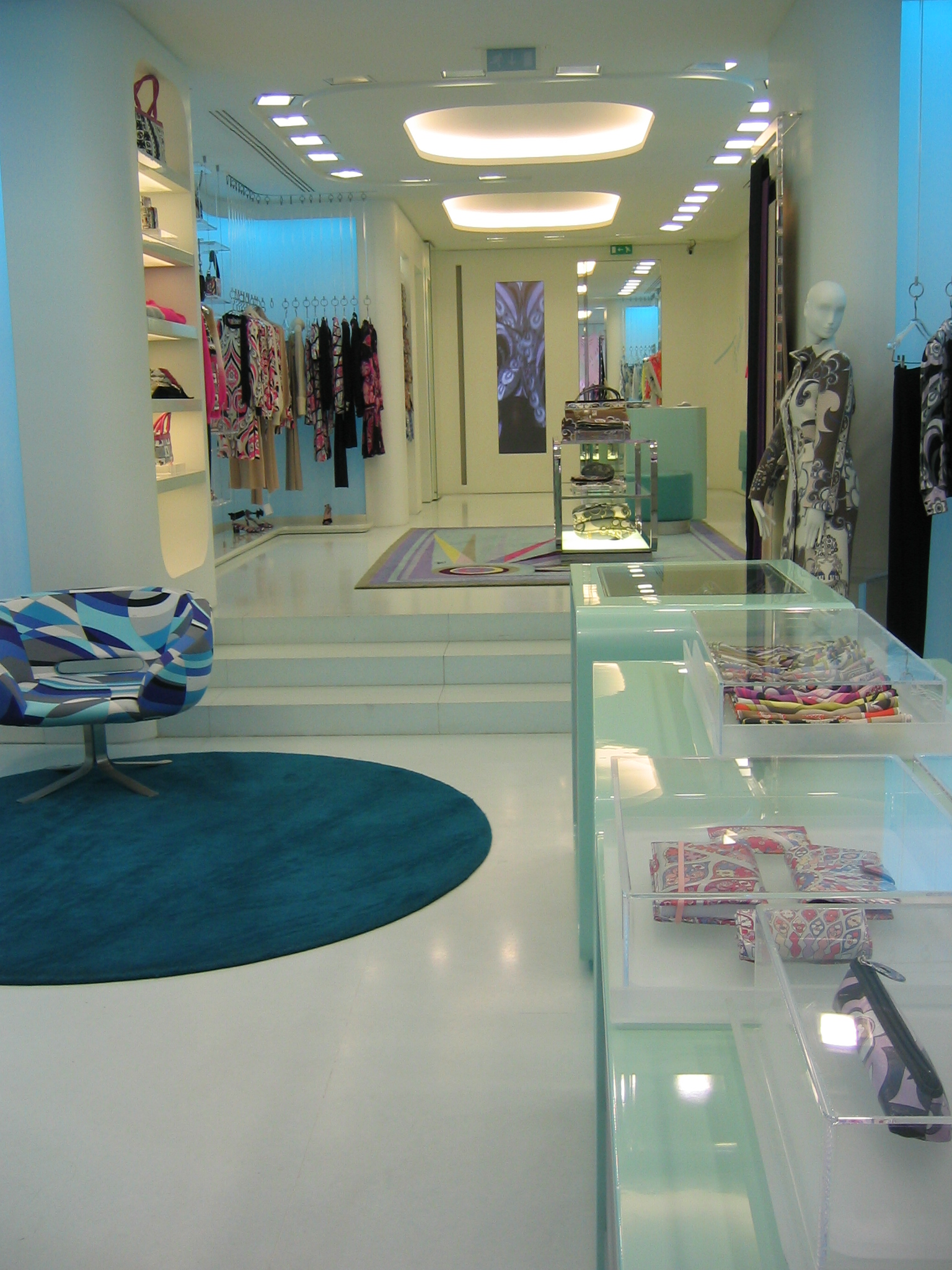 Magasin Emilio Pucci, Paris